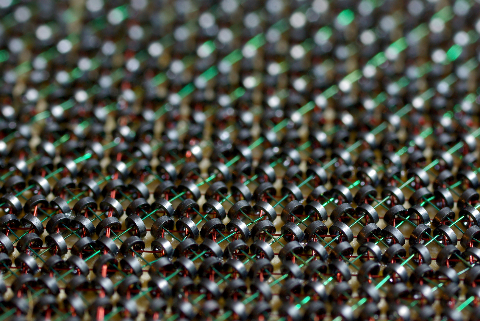 Cette photo a été réalisée à partir d'une carte de mémoire vive de 8 k d'un ordinateur produit par Wang Laboratories (une société informatique du Massachusetts fondée en 1951). La carte mémoire en question mesure 23 x 42 cm. La portion photographiée (environ 3 cm de large) représente 19 bits de large(moins de 3 octets). Voir détails sur